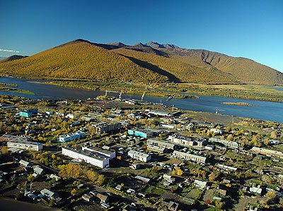 Поселок Ключи